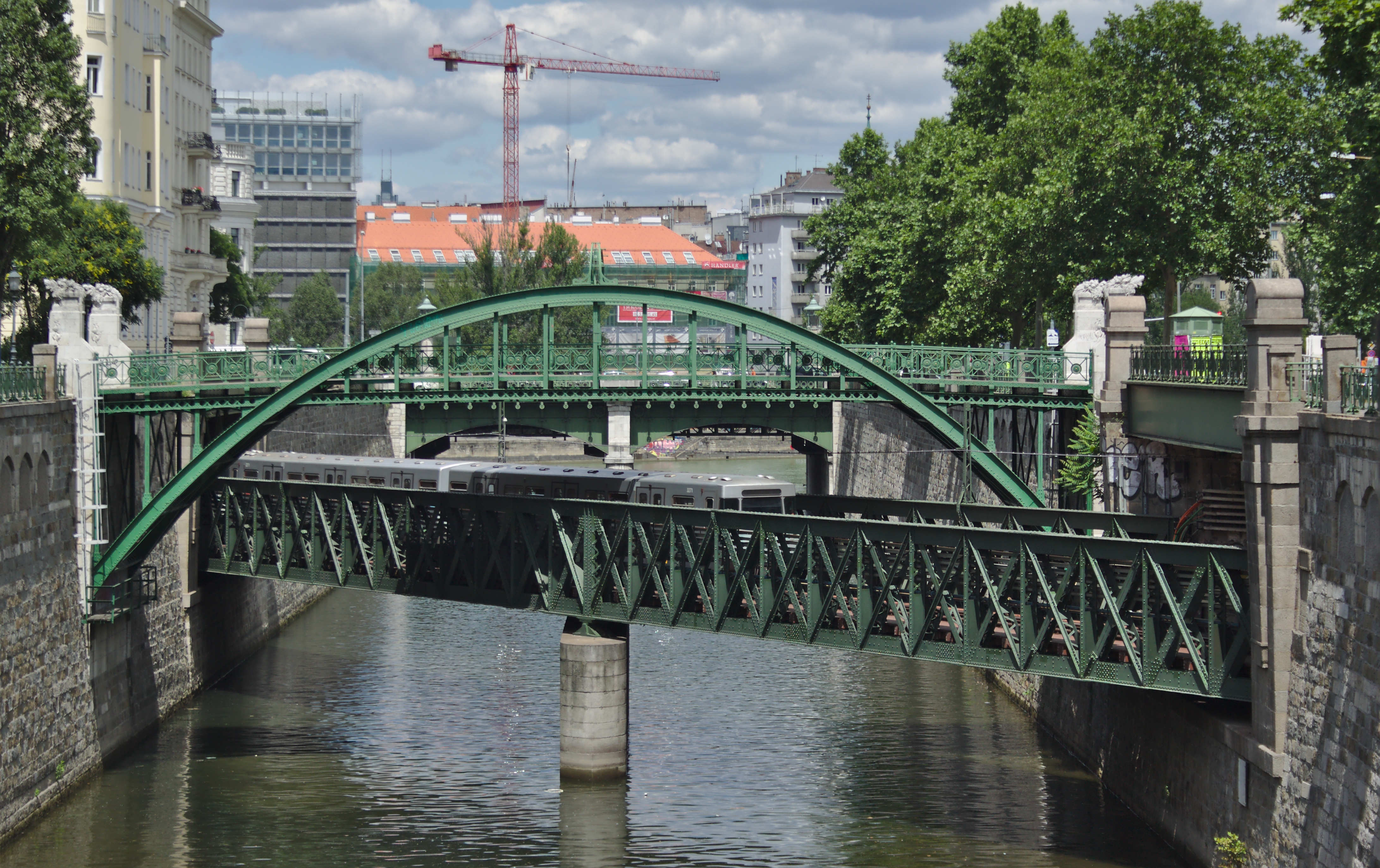 Wientalverbauung, Zollamtssteg und U-Bahn-Brücke